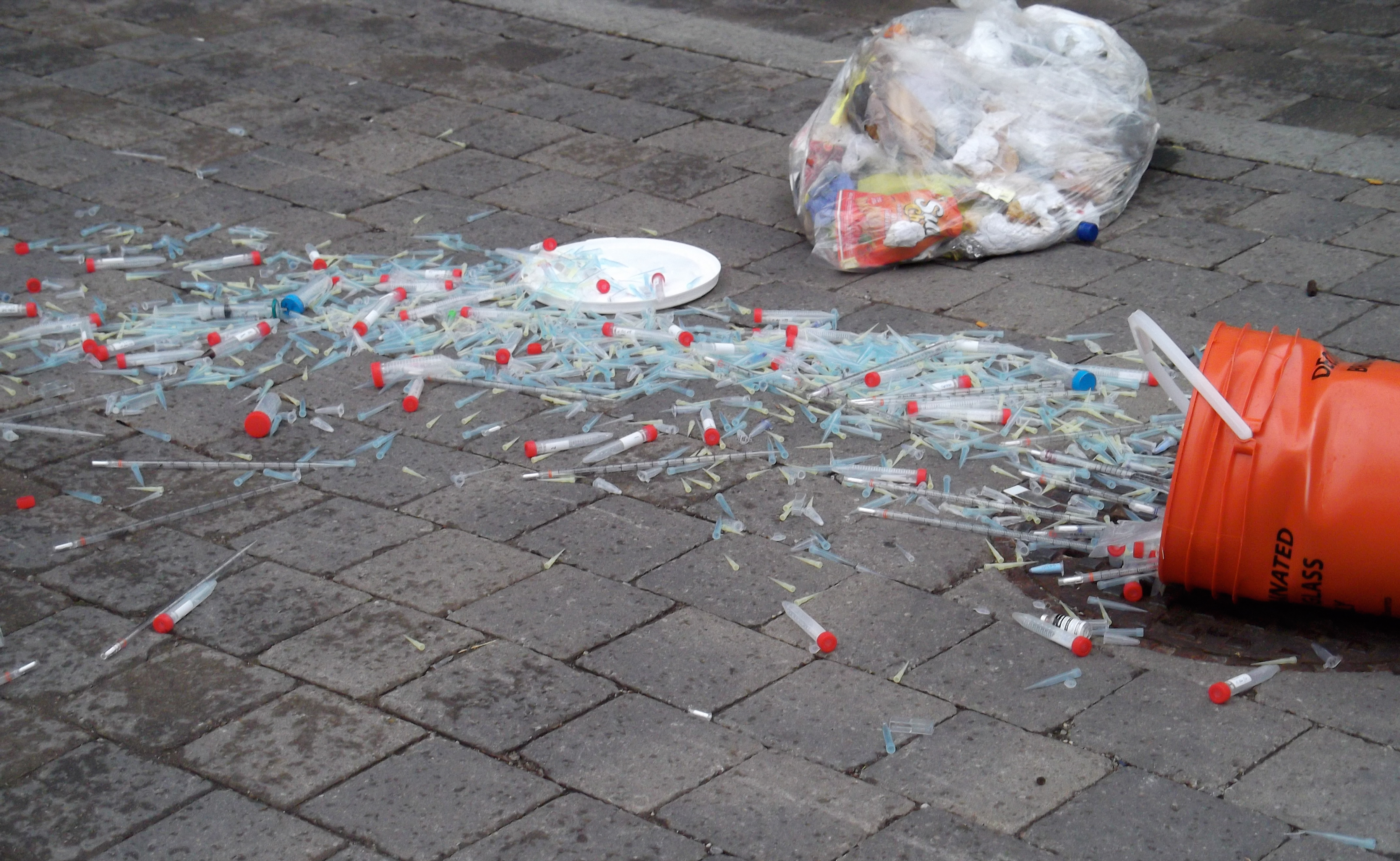 Syringes